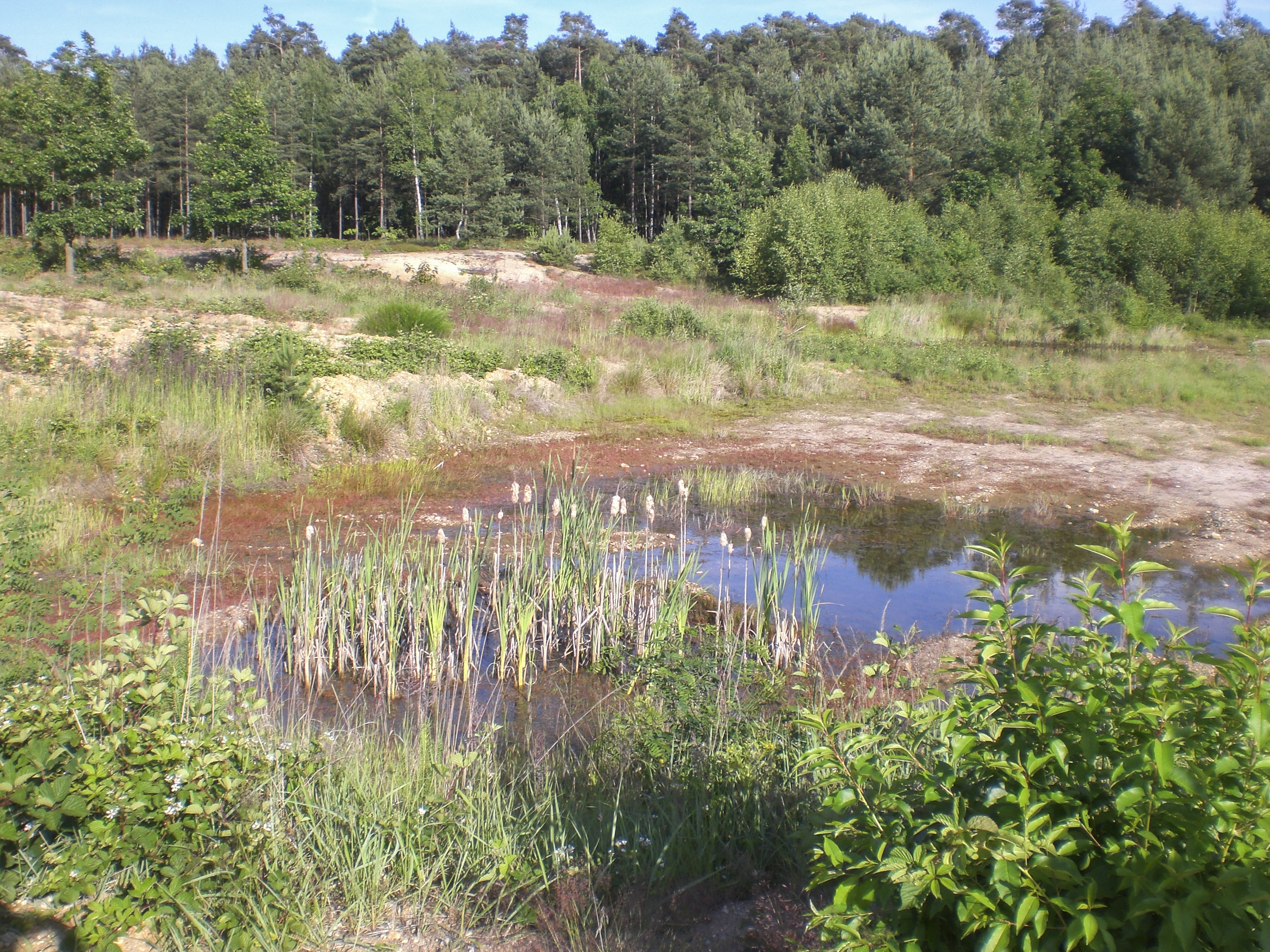 Naturschutzgebiet, Sandgruben am Föhrenbuck, Nürnberg